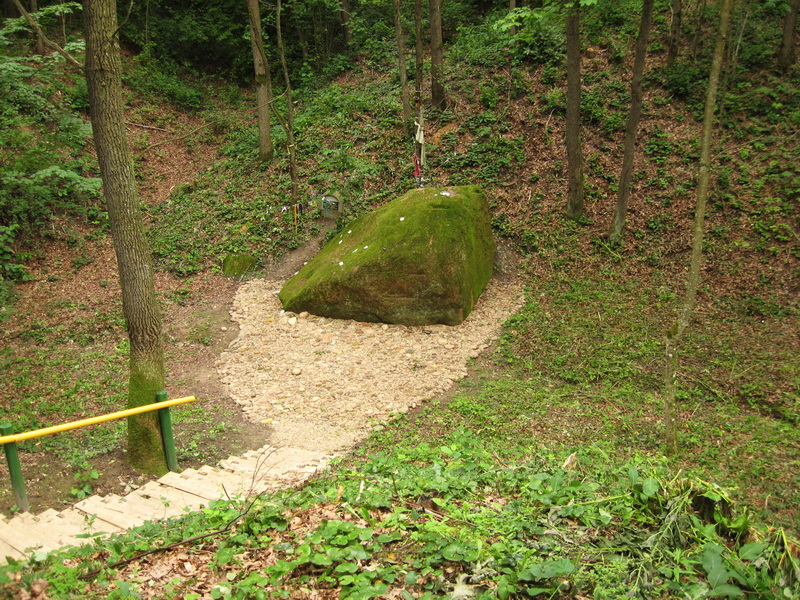 Нявесцін камень. Ашмянскі раён